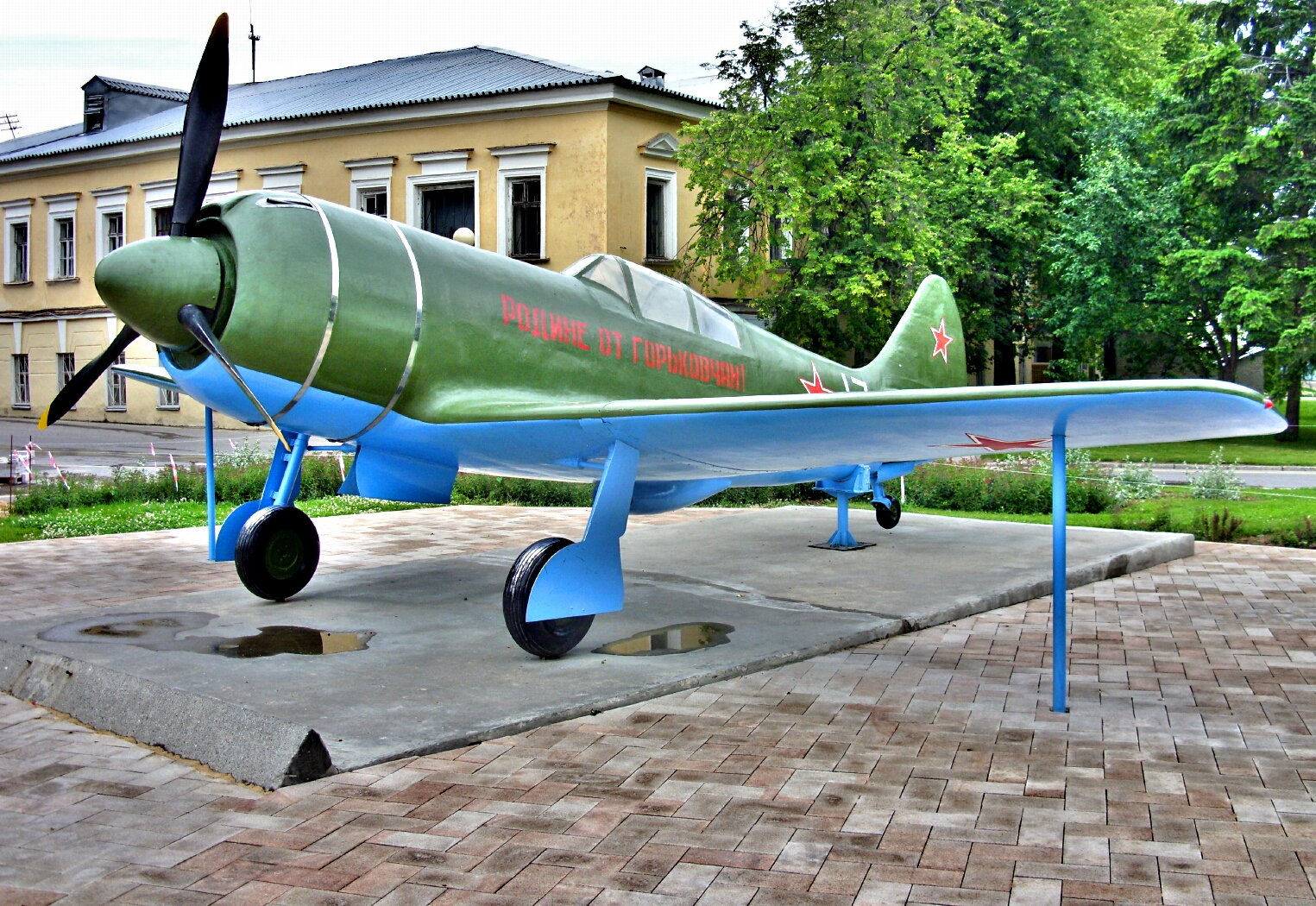 Истребитель Ла-7 «Родине от горьковчан!» — памятник Герою Советского Союза В.Г. Рязанову.